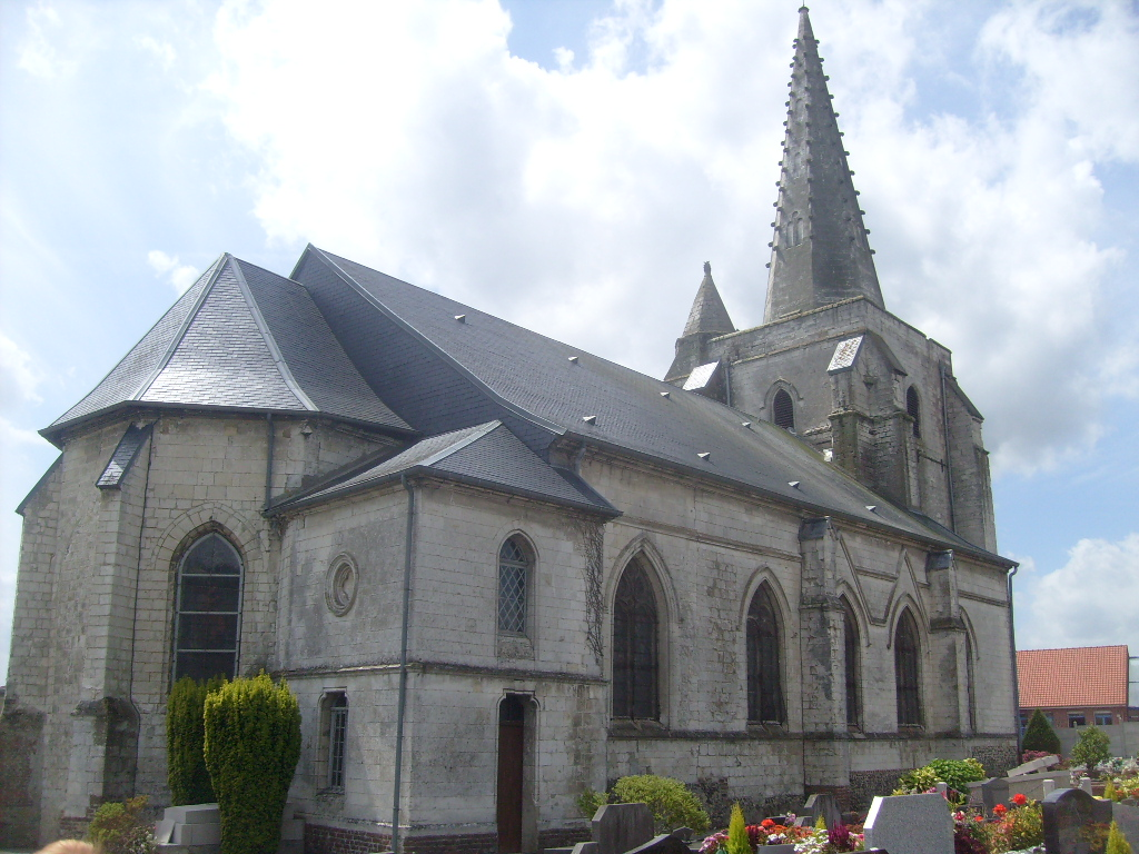 Église de Nielles-Lès-Bléquin